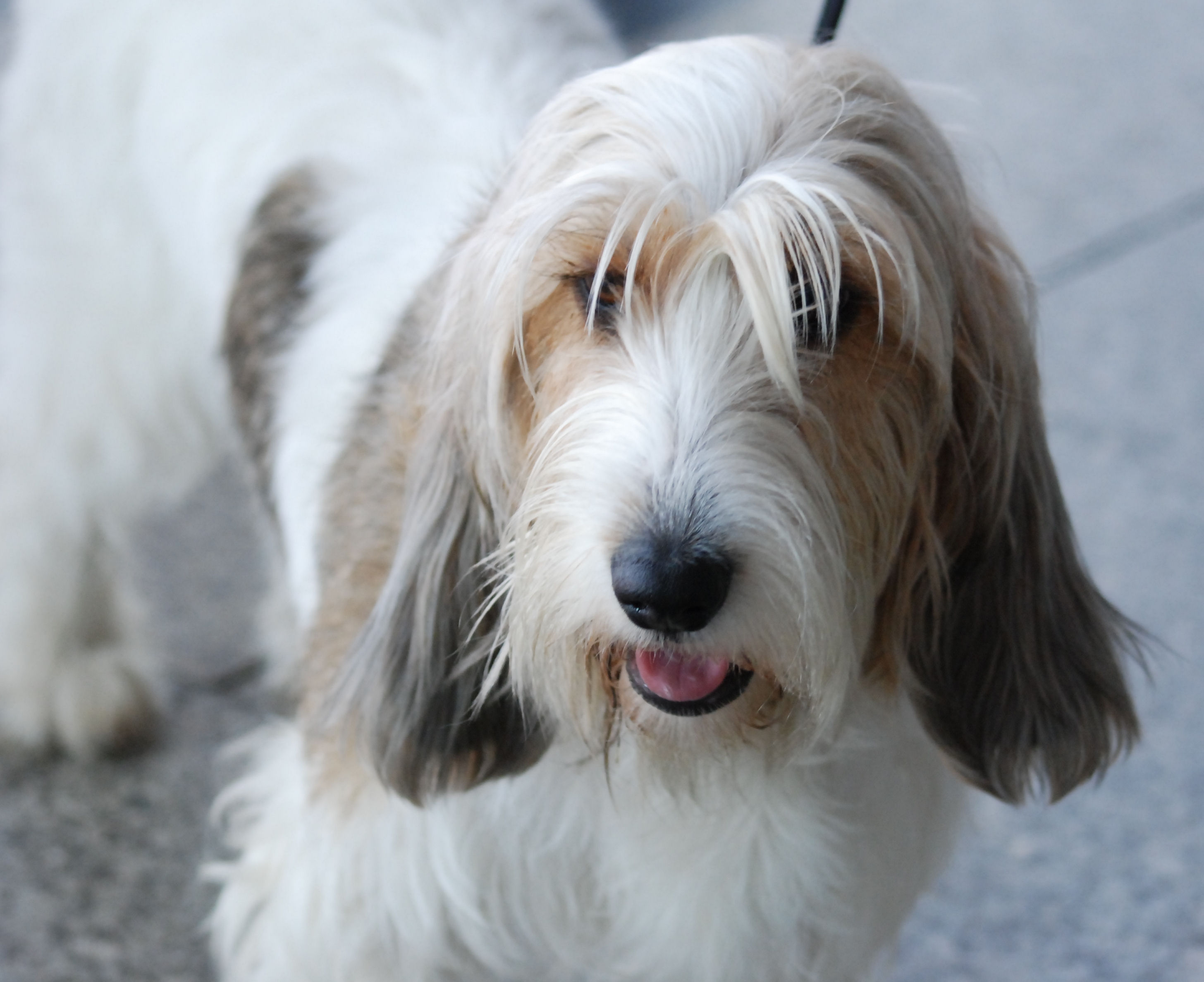 Petit Basset Griffon Vendéen Międzynarodowa Wystawa Psów Rasowych w Katowicach 28 - 30. 03.2008